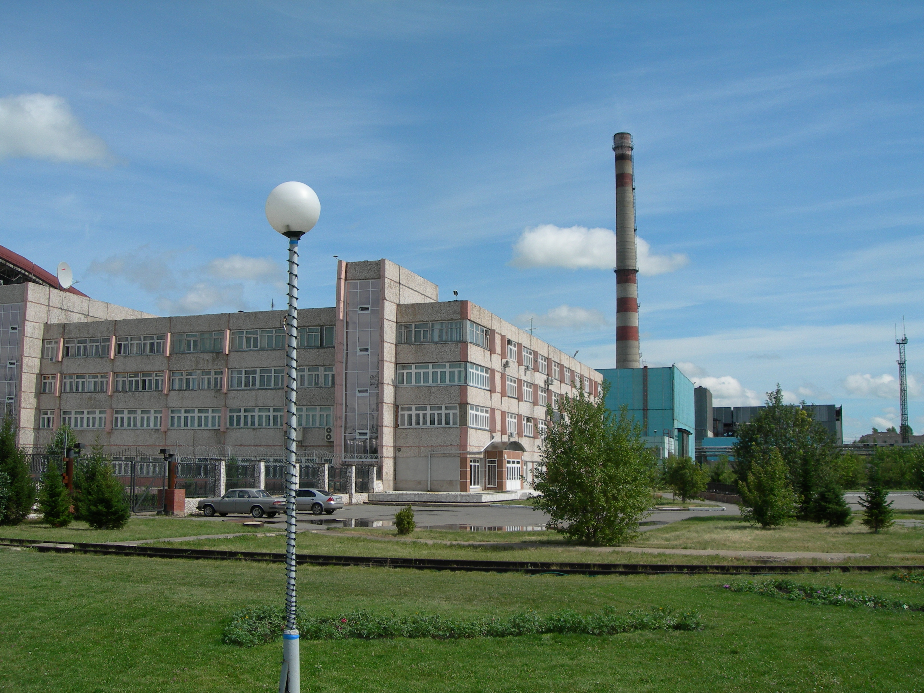 Берёзовская ГРЭС